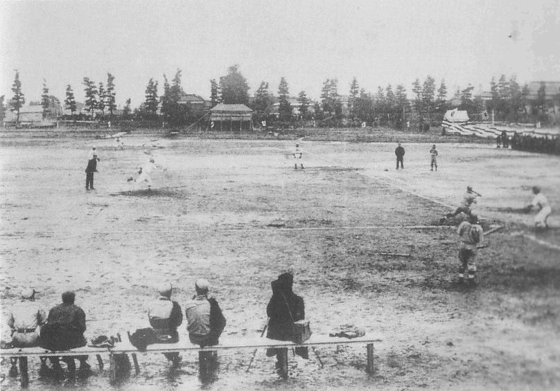 a ballpark of Japan,羽田球場（Haneda Stadium、1909-1916）